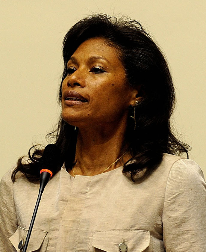 La parlamentaria Cecilia Tait Villacorta, durante la sesión vespertina efectuada por el Pleno, en el cual fijó su posición respecto a uno de los temas en debate.